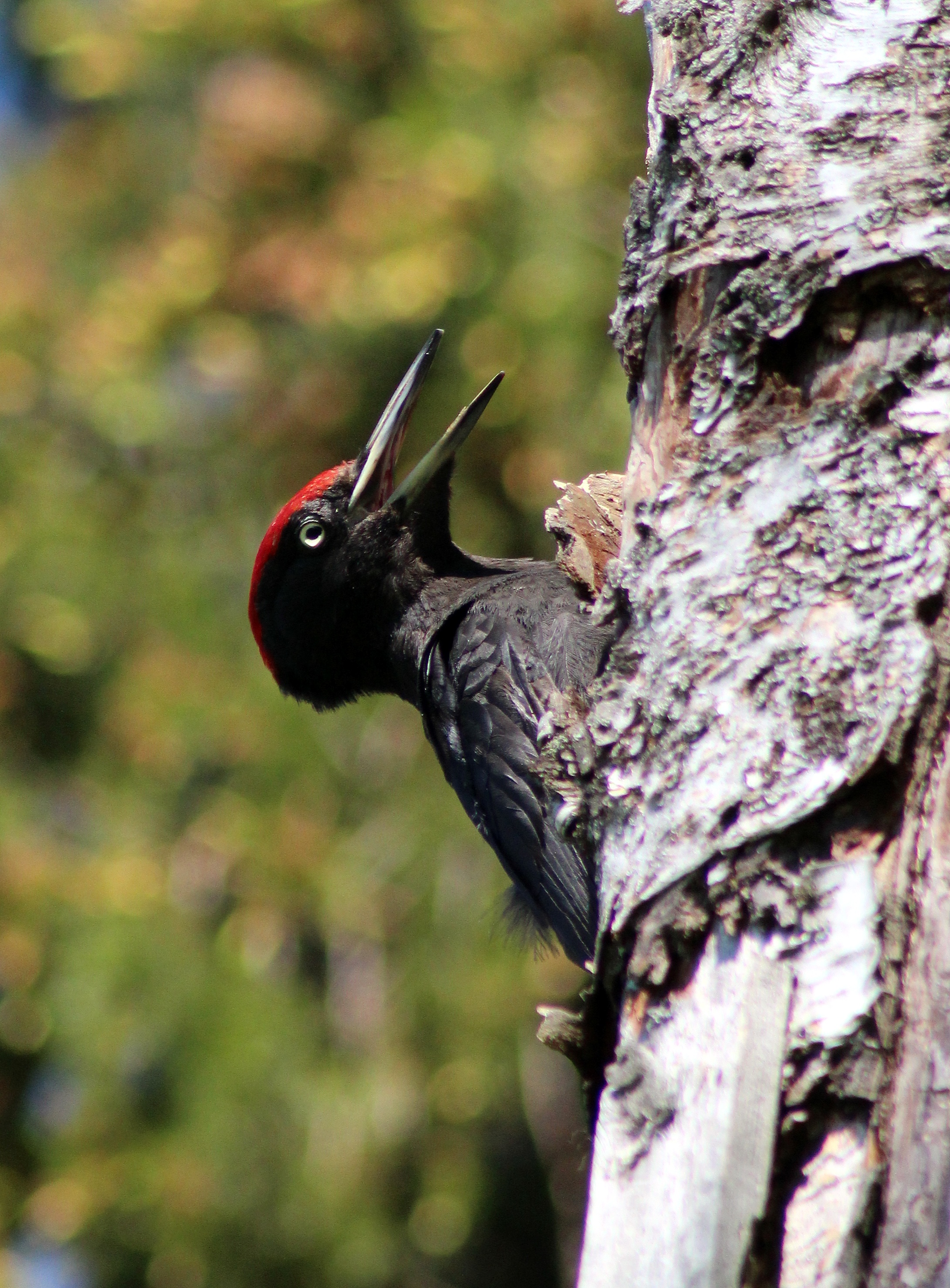 Palokärki (Dryocopus martius) Haukiputaalla.